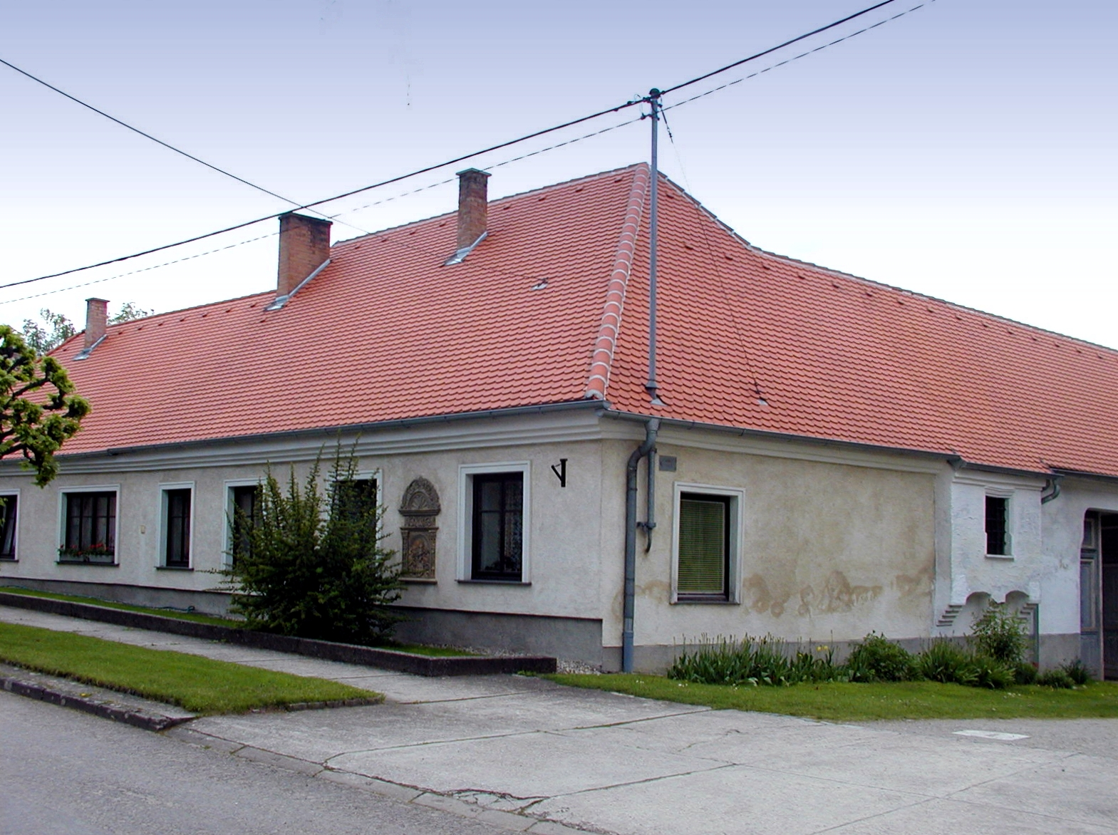 ehem. protestant. Pfarrhof in Sitzendorf, Sitzendorf an der Schmida Object location48° 35′ 50.89″ N, 15° 56′ 34.01″ E